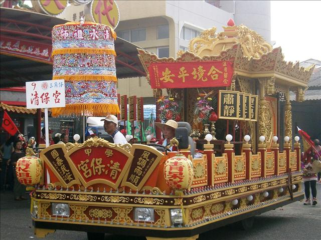 輦宮─台灣神轎形式之ㄧ（台灣學甲鎮）。